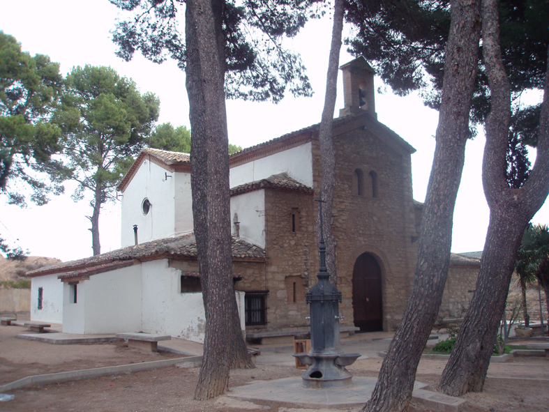 Ermita de Santa Cruz (Tudela), en 2010